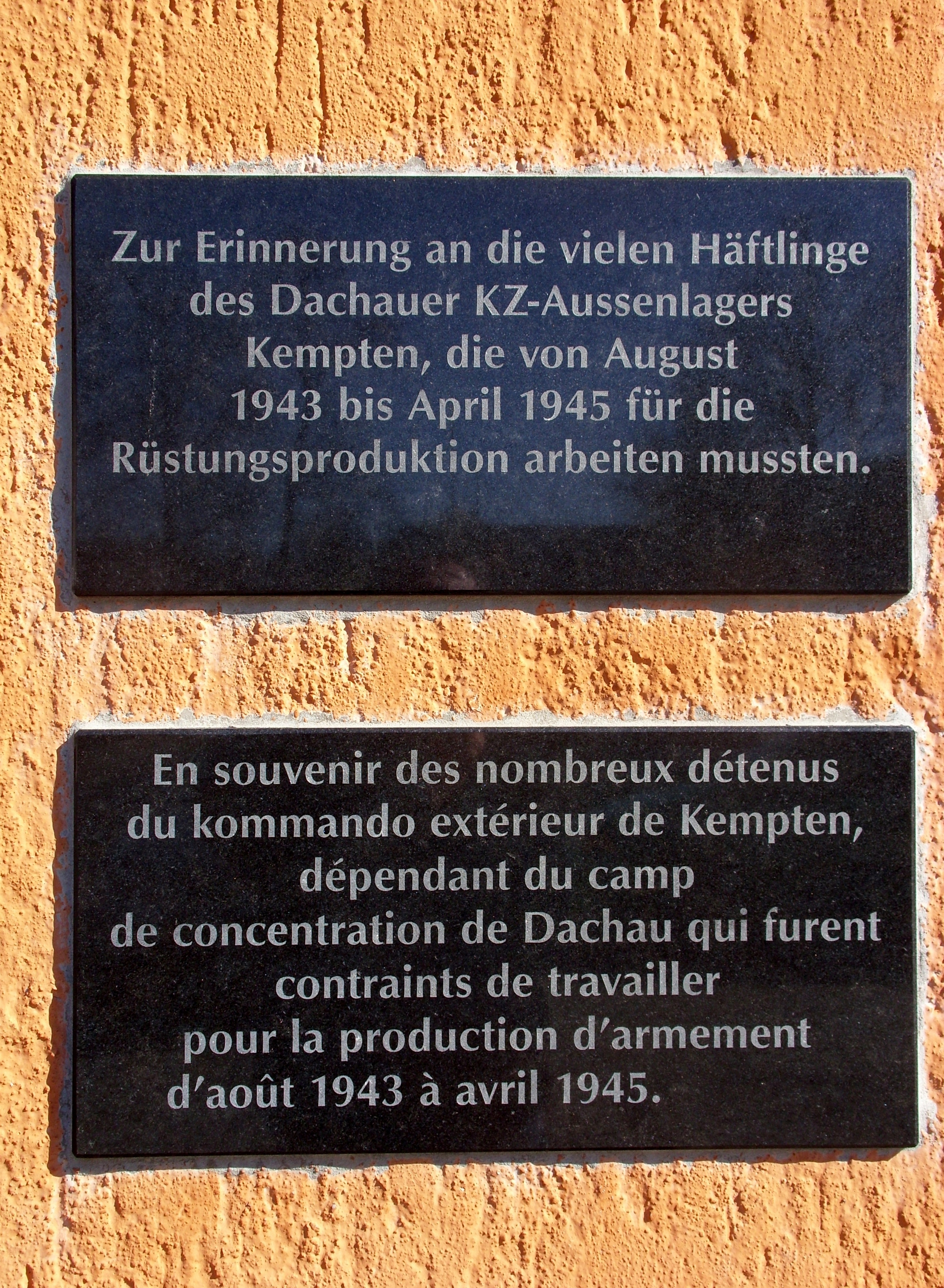 Gedenktafel zum KZ-Außenlager Kempten an der Tierzuchthalle / Allgäuhalle